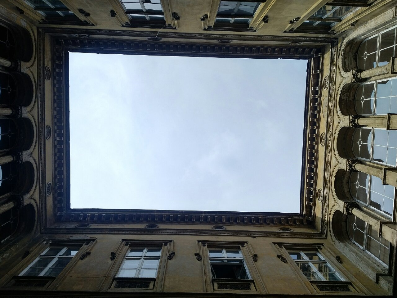 Kilátás az égre az Unger-ház udvarából.